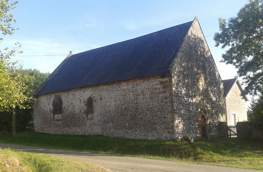 Prieuré Sainte-Catherine de Varennes-l'Enfant (Inscrit) .